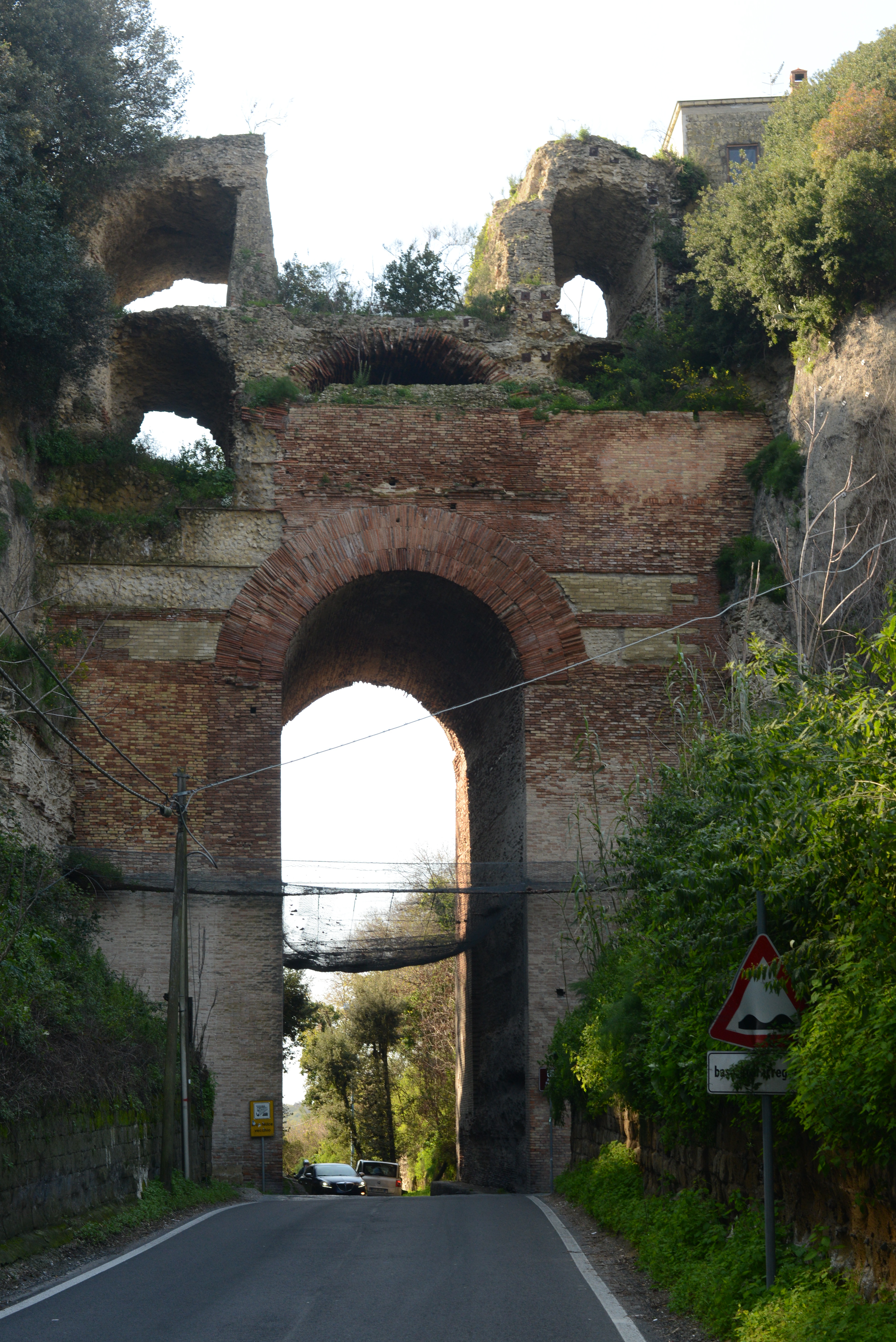 L'Arco Felice romano, Pozzuoli